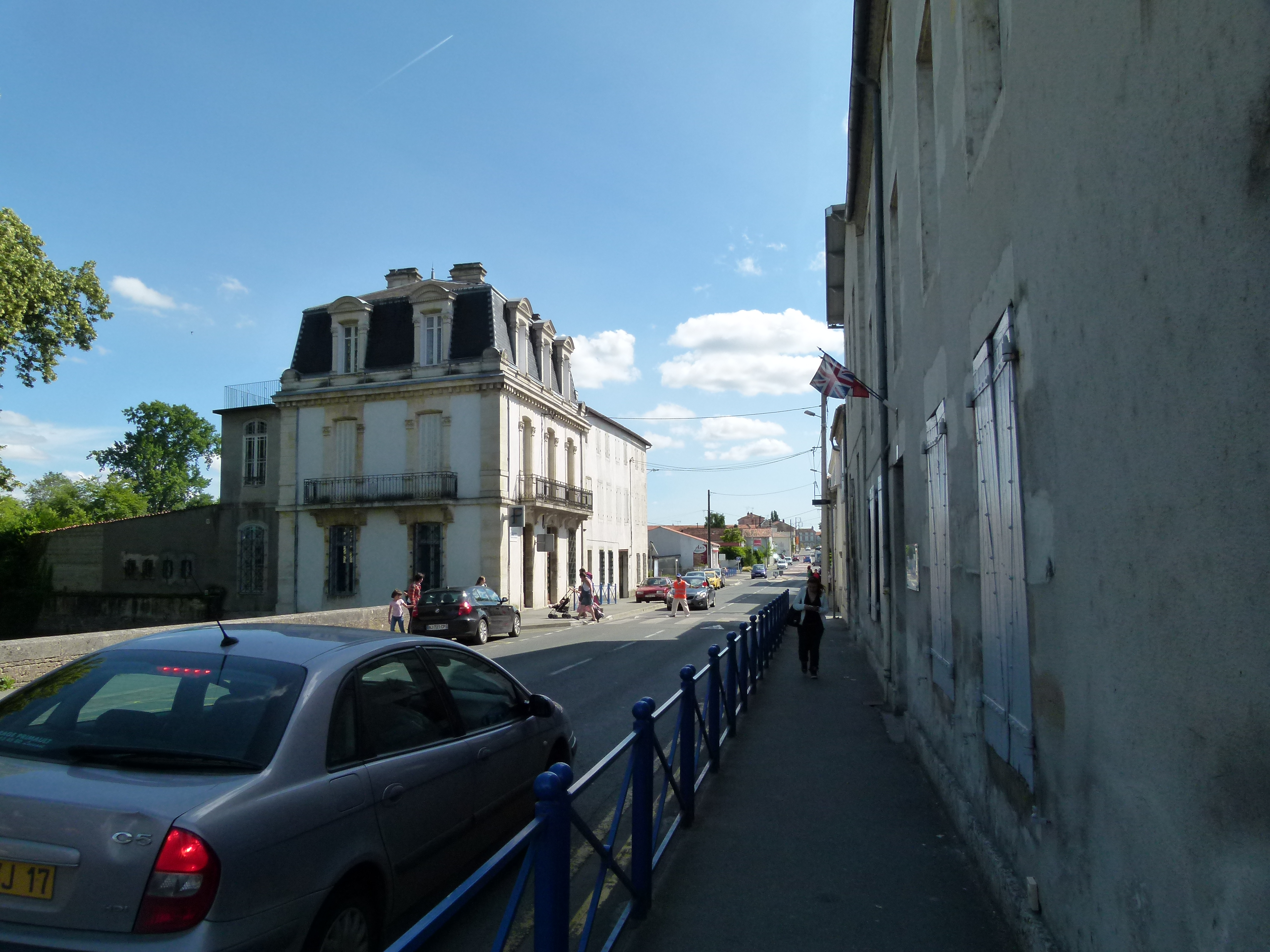 La rue du faubourg Saint-Pierre à Surgères débute au pied du Château de Surgères face à la place de l'Europe.